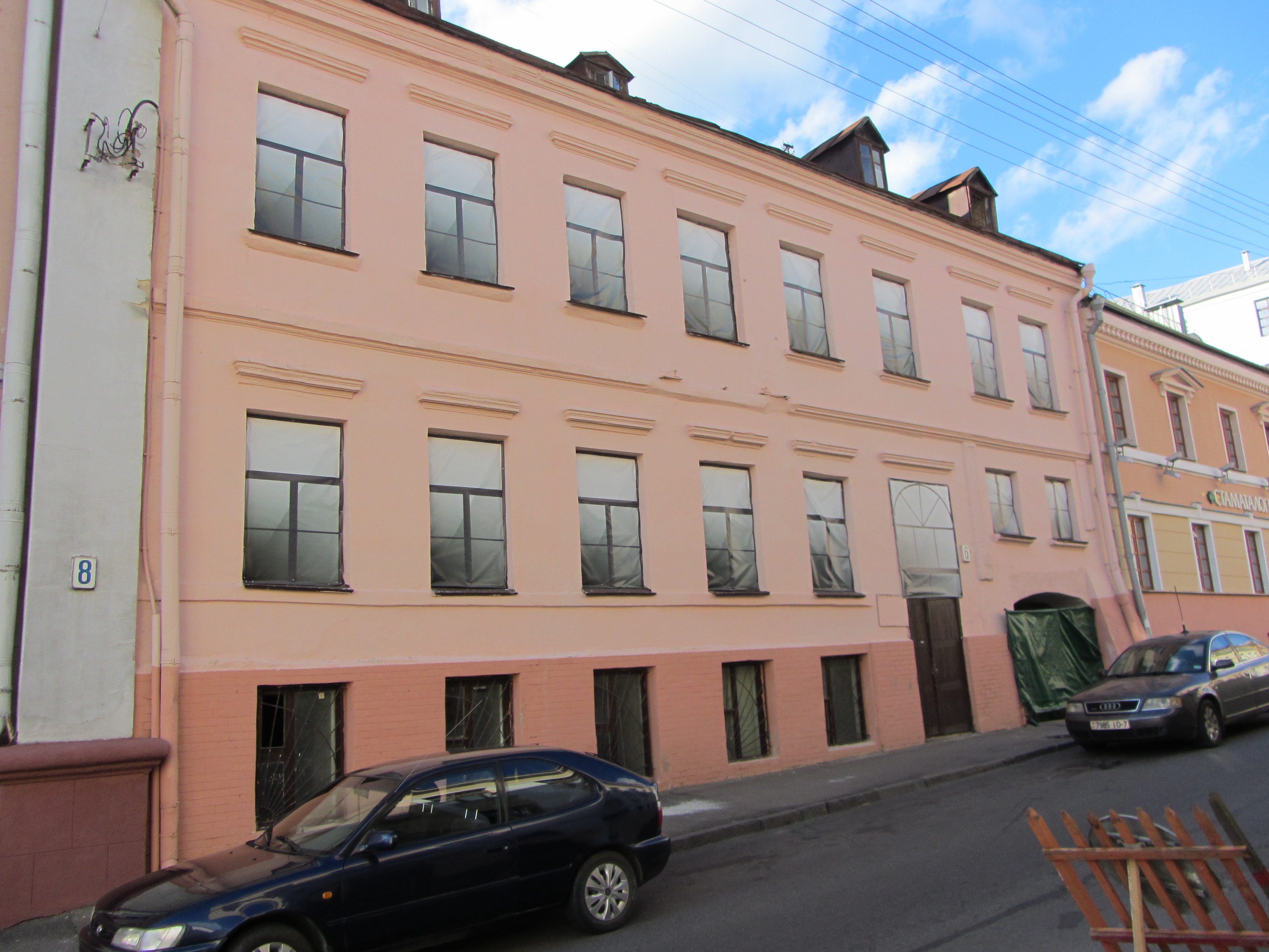 Беларуская (тарашкевіца): Вуліца Рэвалюцыйная, 6